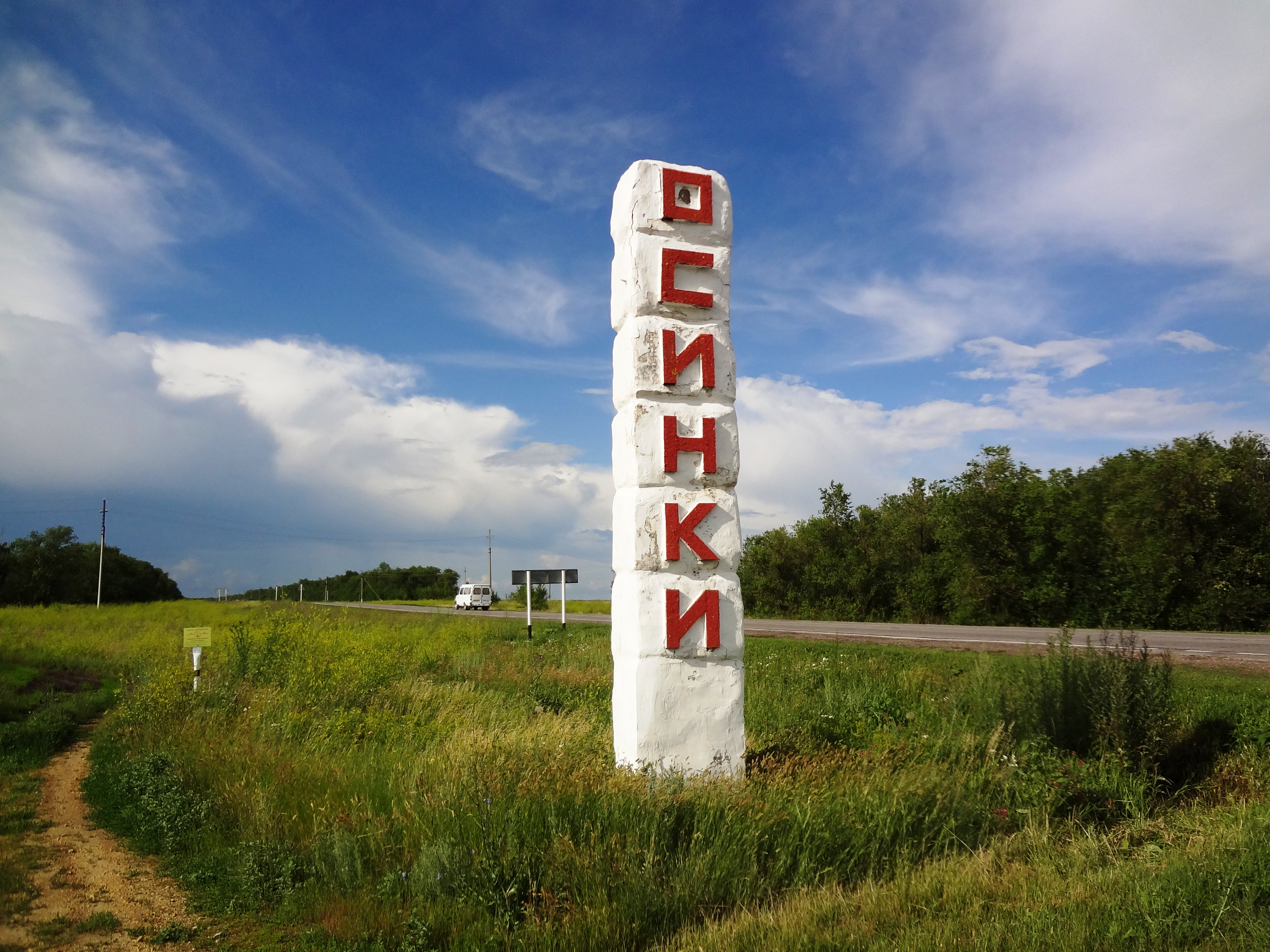 Осинский столб Поселок Осинки Самарская область Безенчукский район